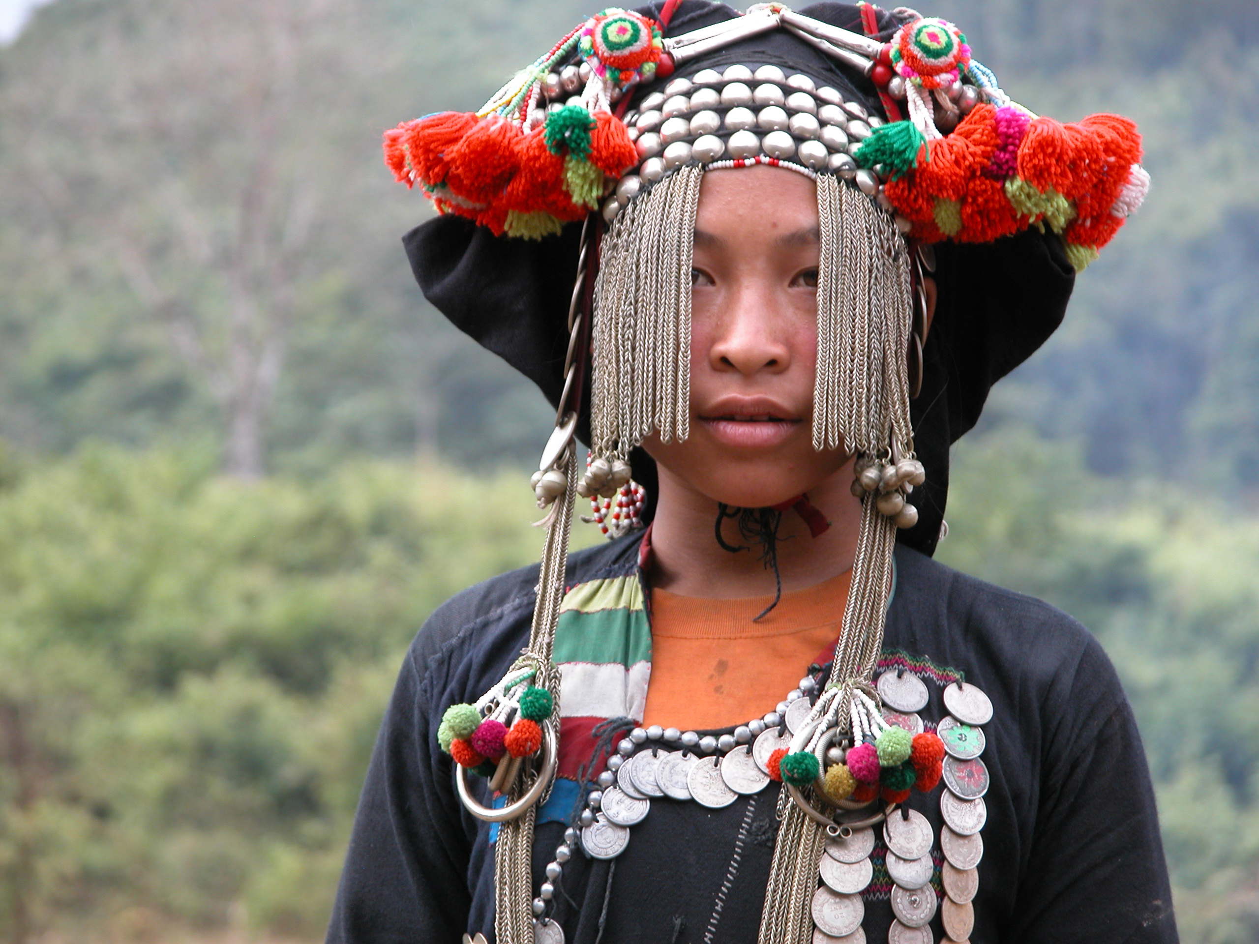 ethnie Akha, Laos nord.